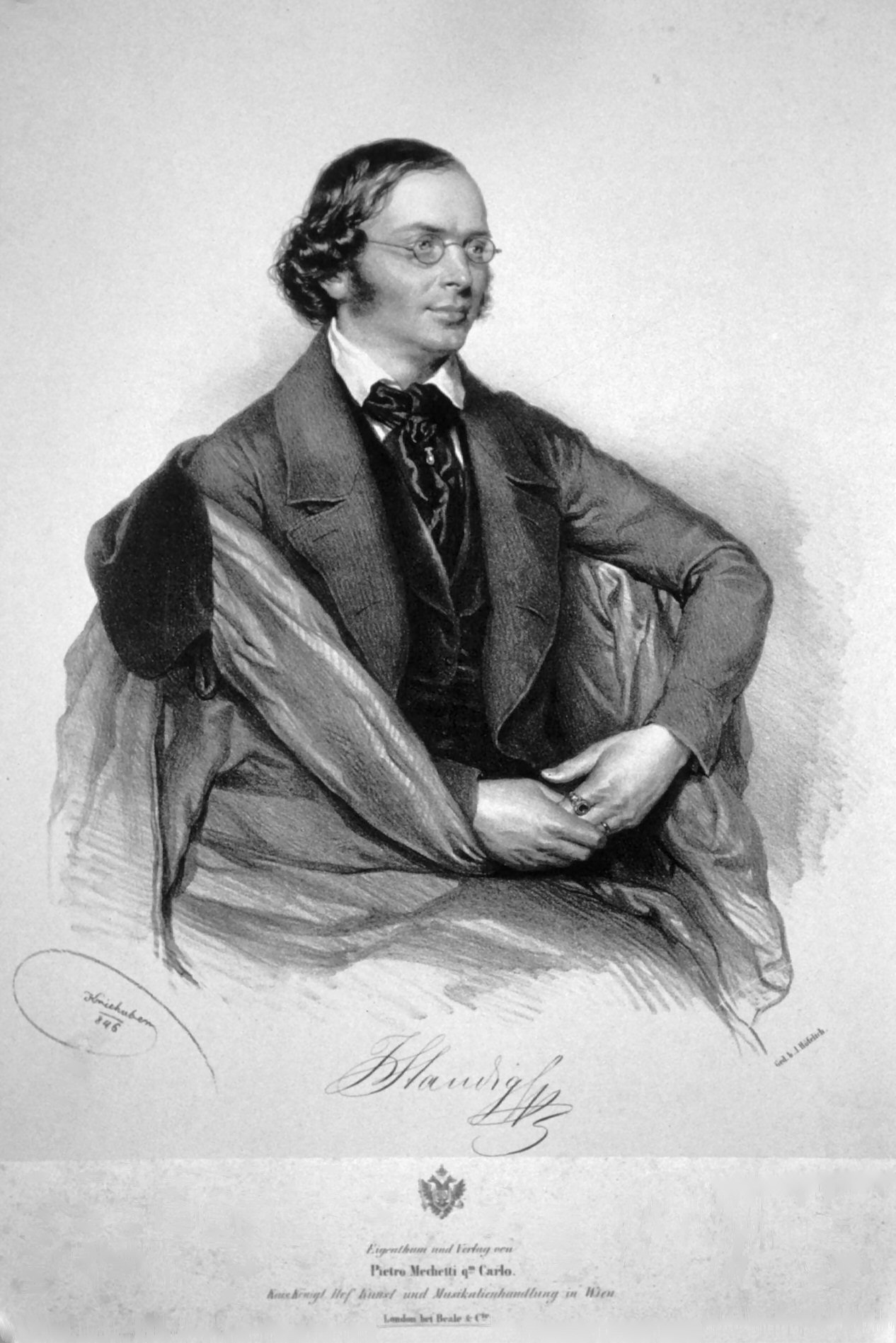 Josef Staudigl, Lithographie von Josef Kriehuber, 1846